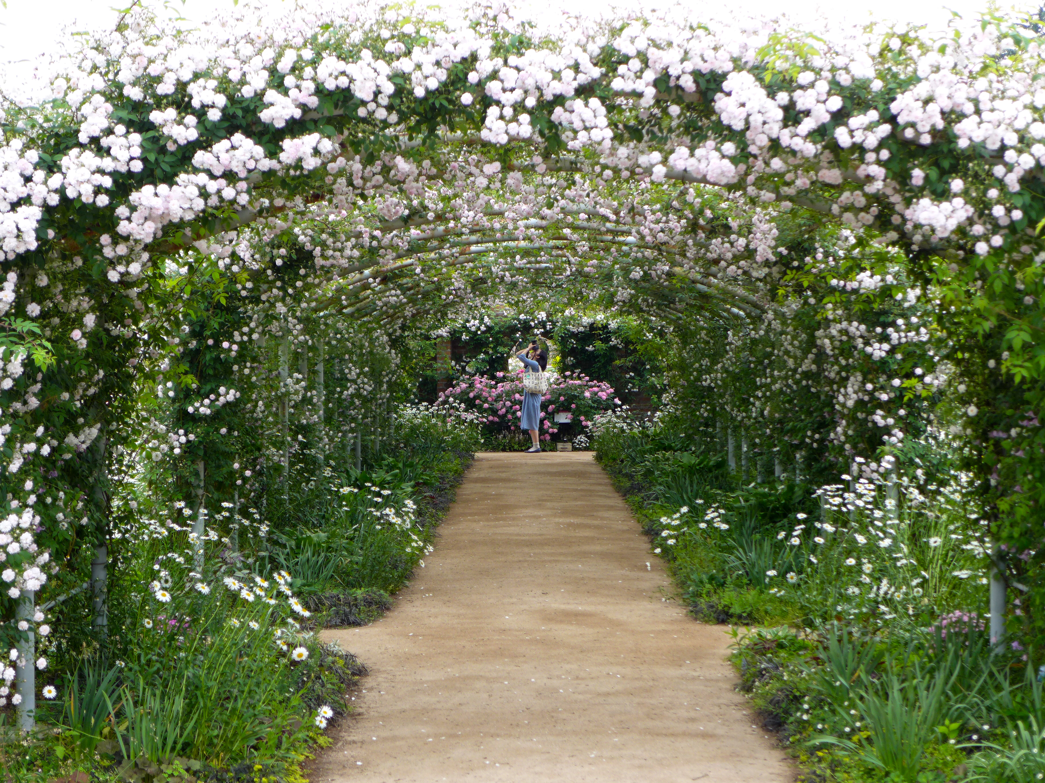 Rose, Paul's Himalayan Musk Rambler, バラ, ポールズ ヒマラヤン ムスク ランブラー, Climbing rose つるバラ United Kingdom イギリス Paul 1916